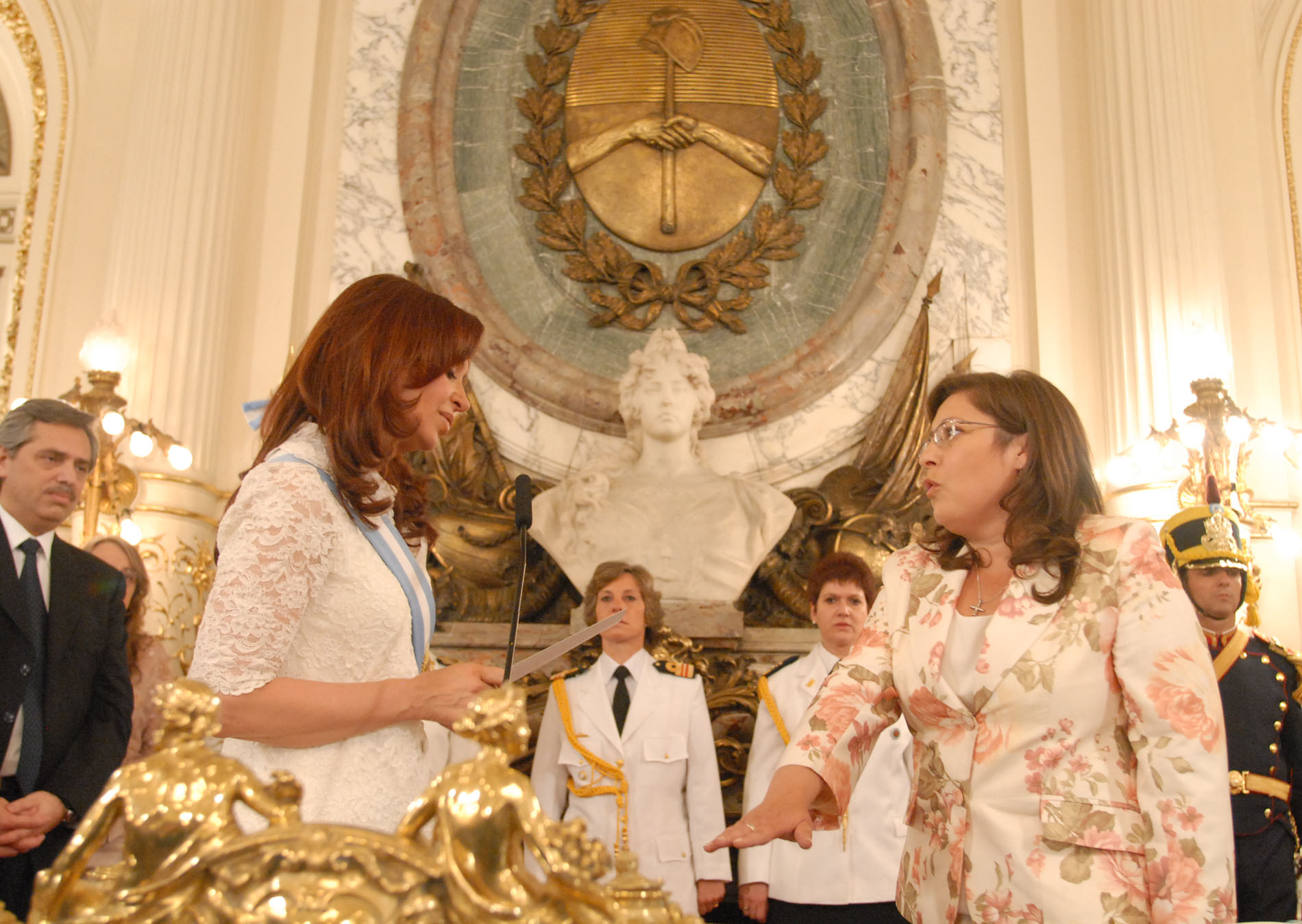 La presidenta Cristina Fernández toma juramento a la ministra de Salud Graciela Ocaña.